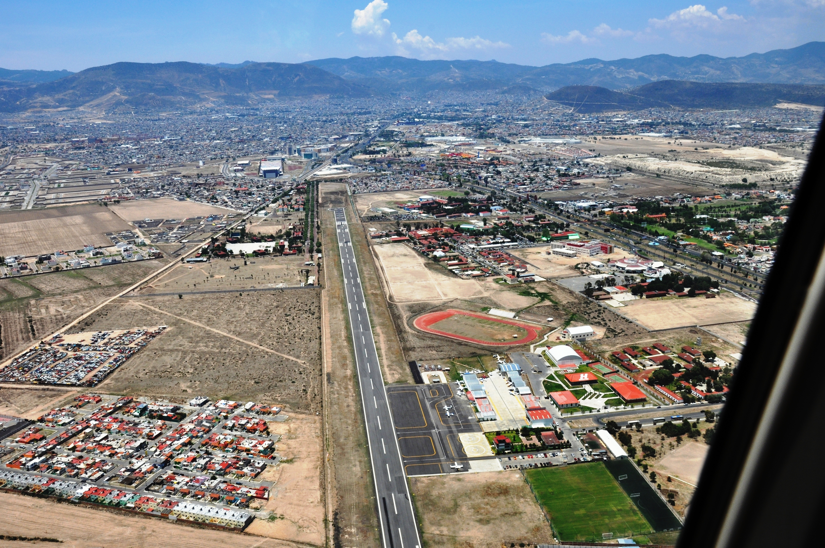 Sobre Pachuca